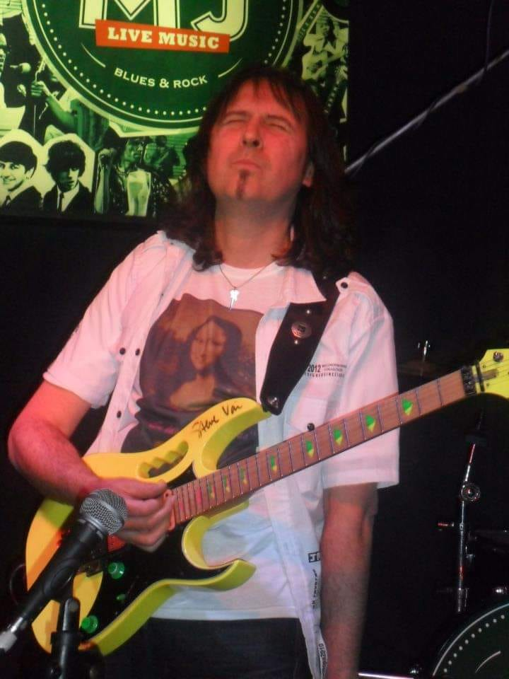 Daniel Telis en un show totalmente instrumental en un bar en la zona oesta de Buenos Aires